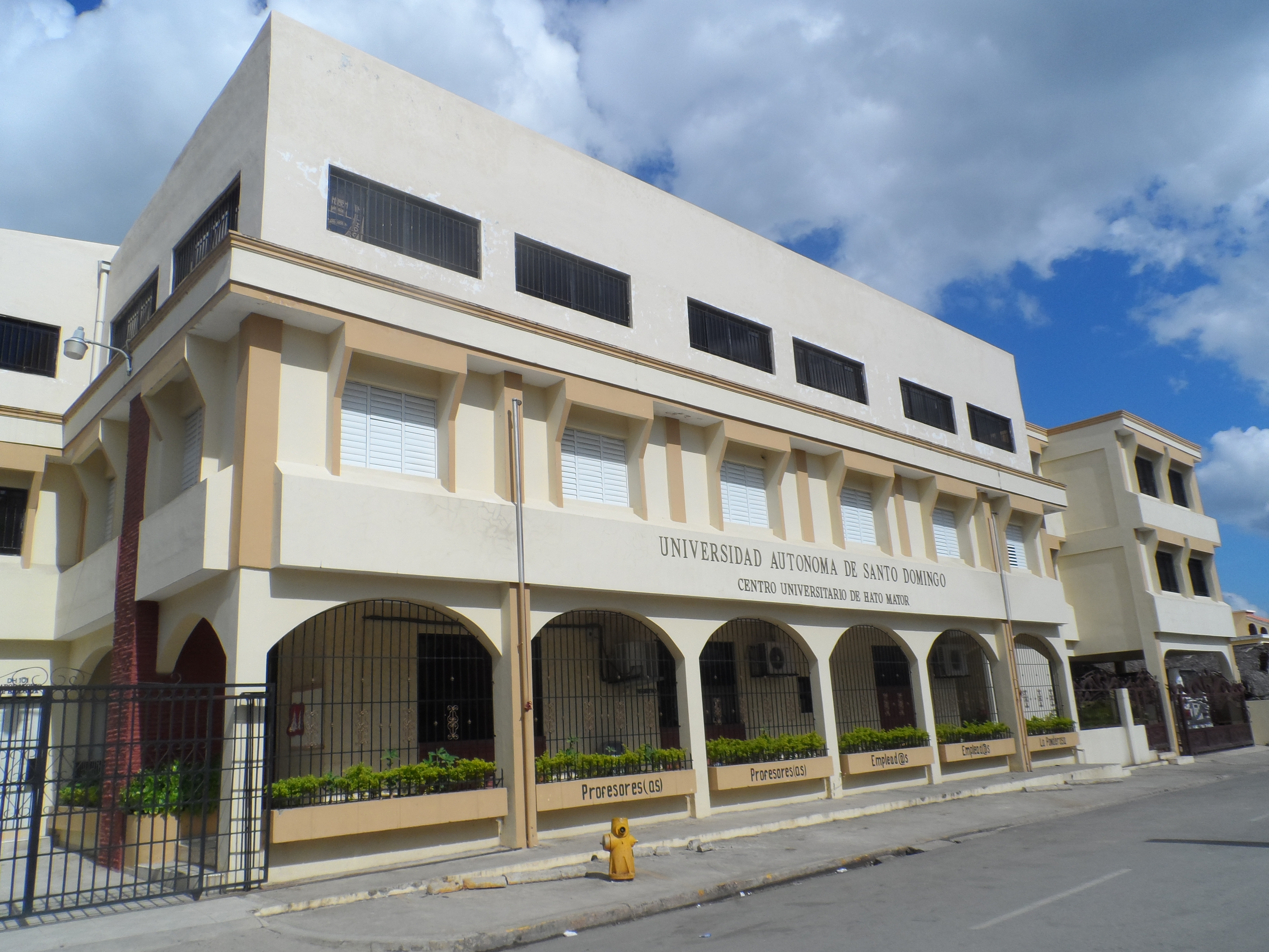 Centro Universitario UASD de Hato Mayor